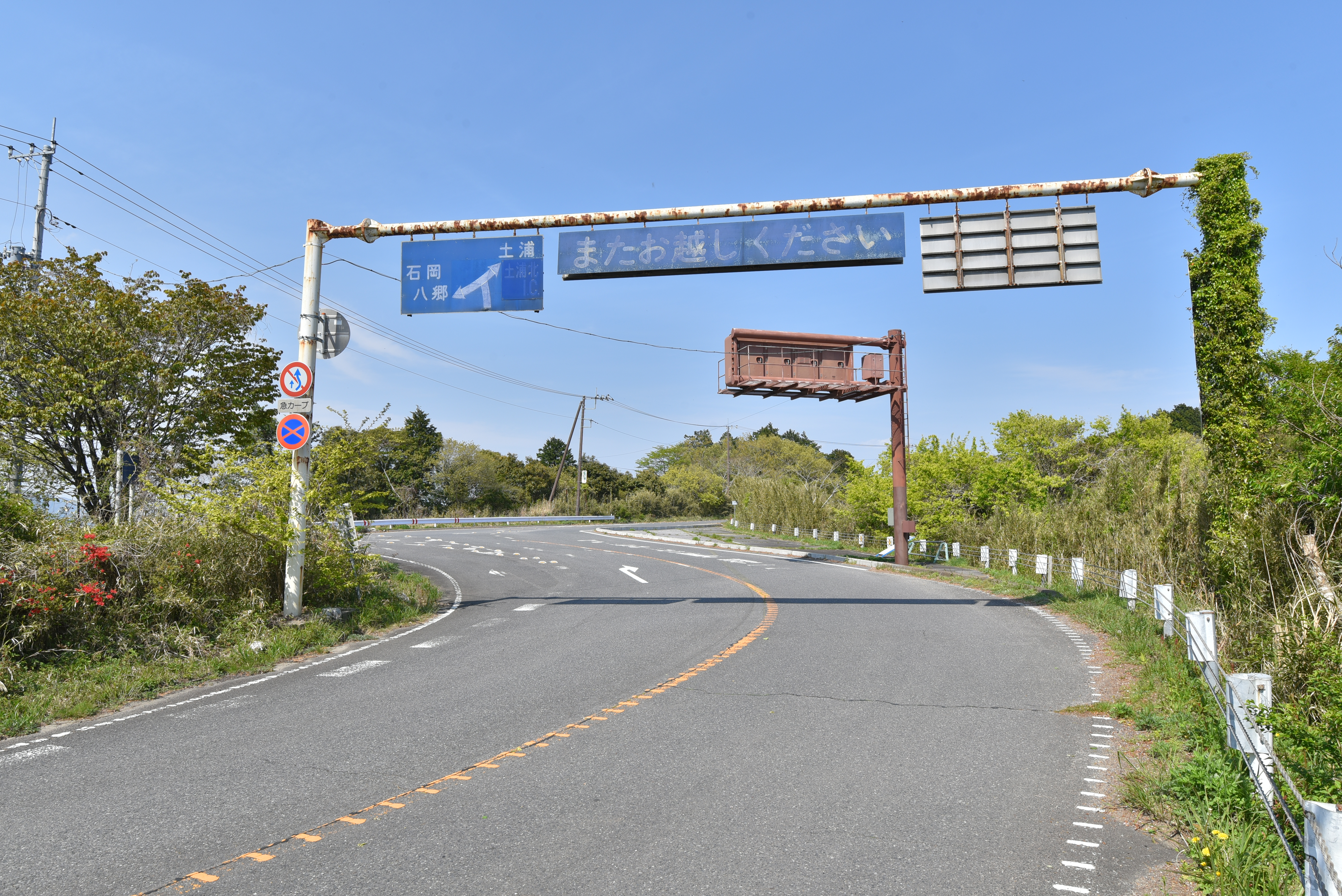 表筑波スカイラインの終点ゲート。土浦市と石岡市の境界の朝日峠に位置し、石岡側に下る広域農道フルーツラインと、土浦側に下る県道との三叉路になっている。